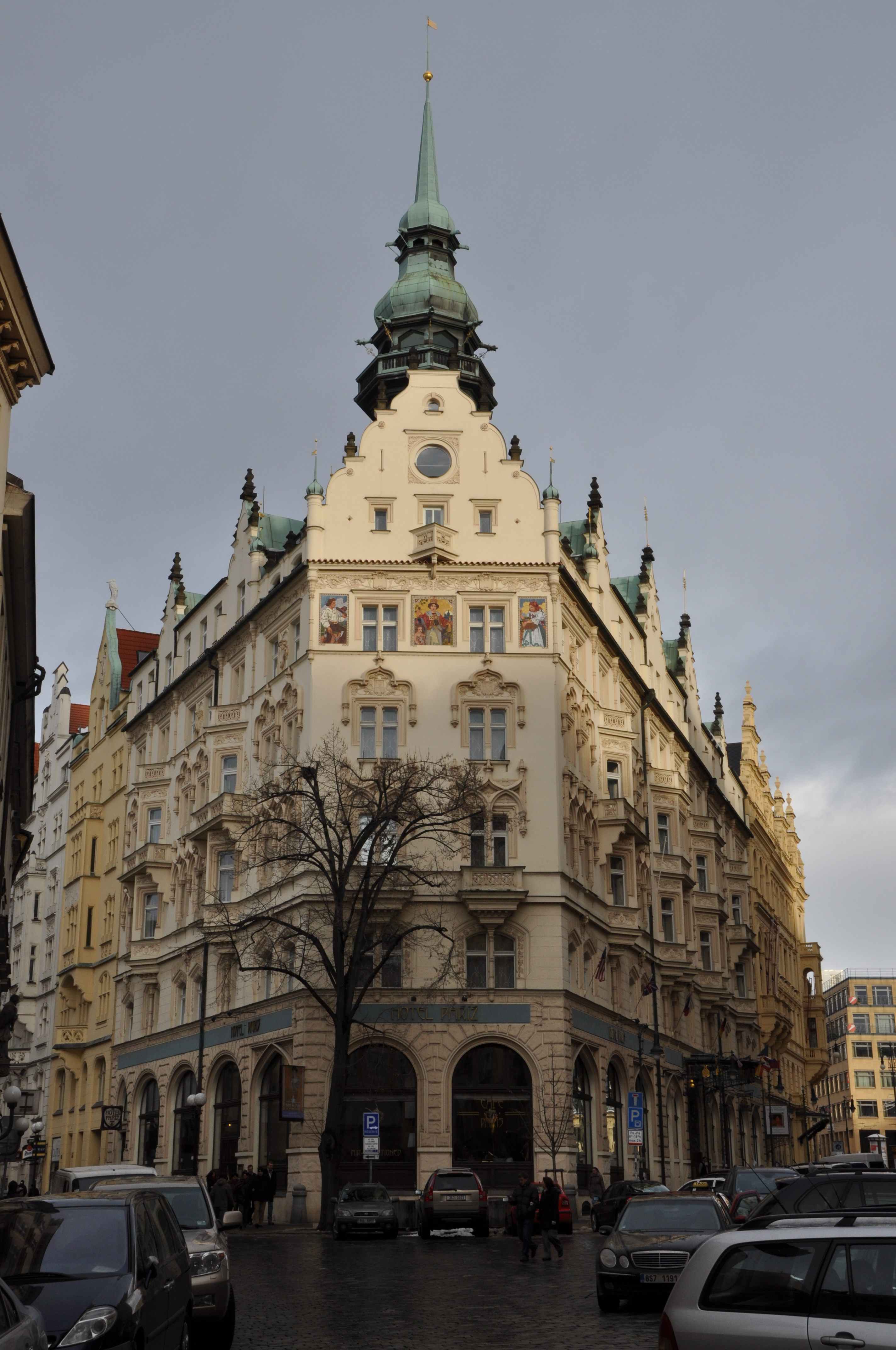 Hotel Paříž v Praze poblíž náměstí Republiky